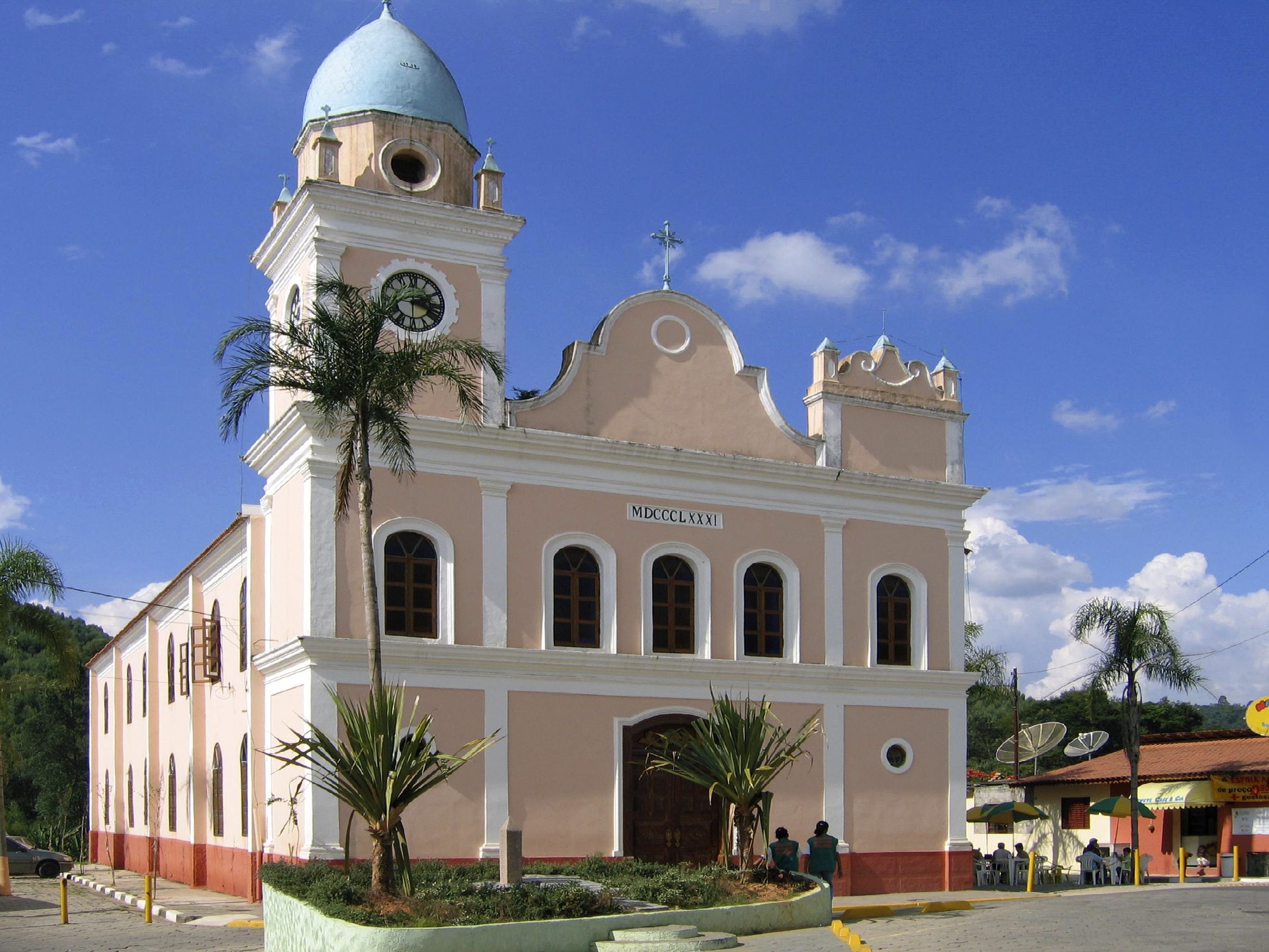 Igreja matriz de Araçariguama